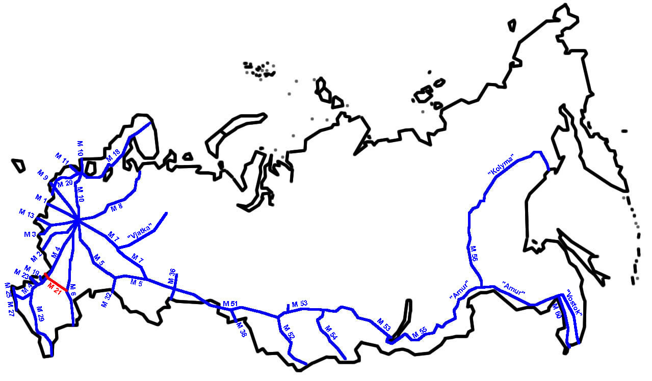 M21 im russischen Fernstraßennetz